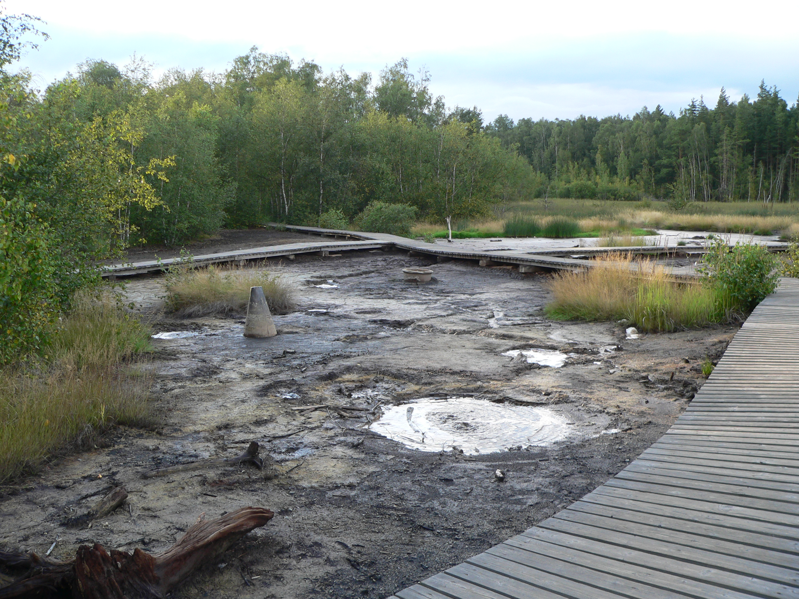 Der Lehrpfad um ein Mofettenfeld, Naturreservat Soos, Tschechische Republik